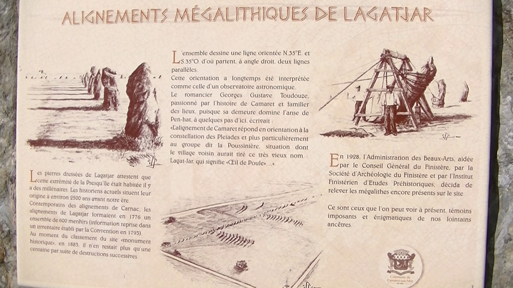 Présentation du site